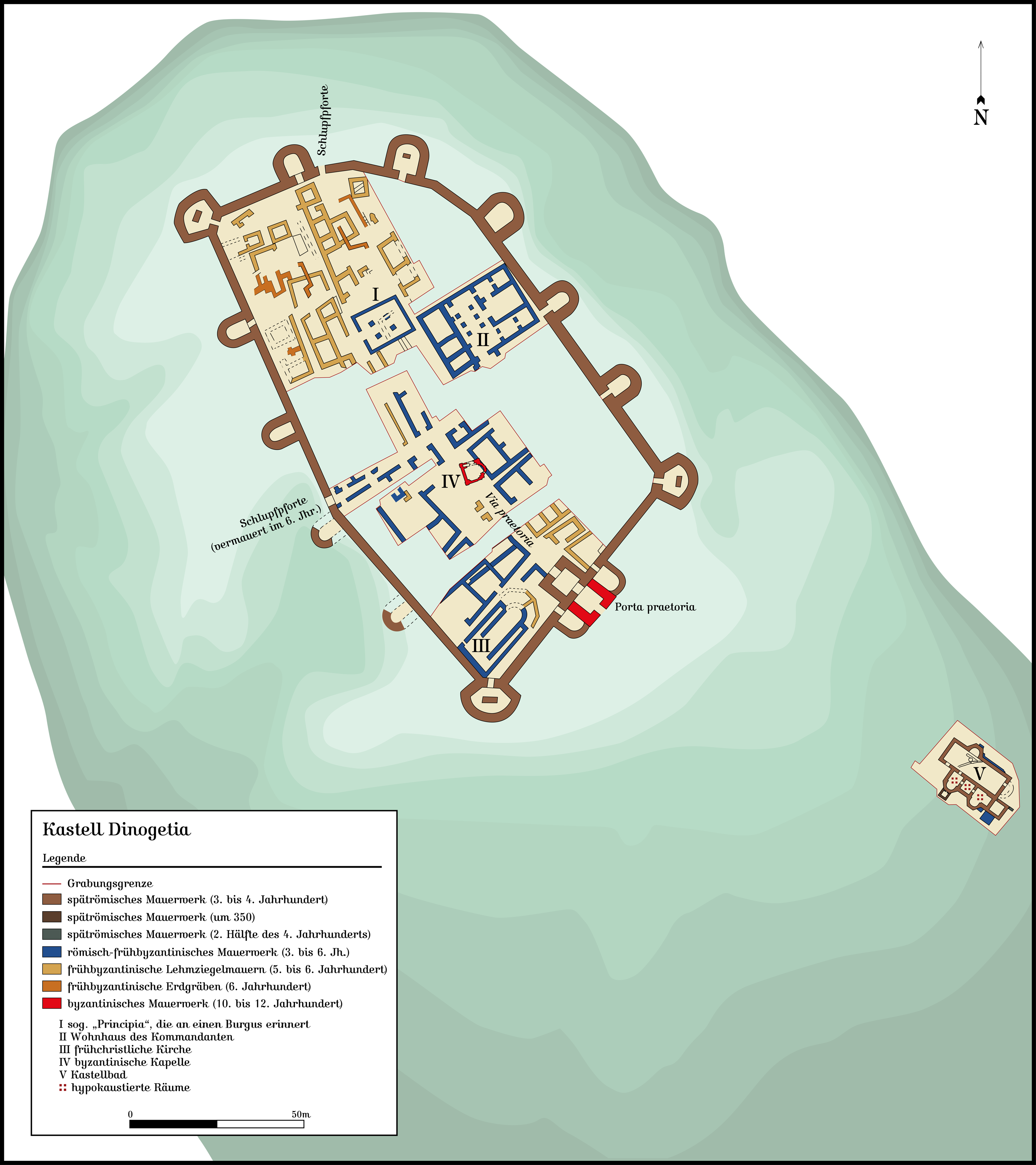 Kastell Dinogetia, Rumänien. Plan der Befunde nach den Grabungen ab 1939 bis zum Ende des 20. Jahrhunderts. Hergestellt am Macintosh unter Macromedia Freehand MX; abgespeichert für Wikipedia unter Adobe Photoshop CS 2.